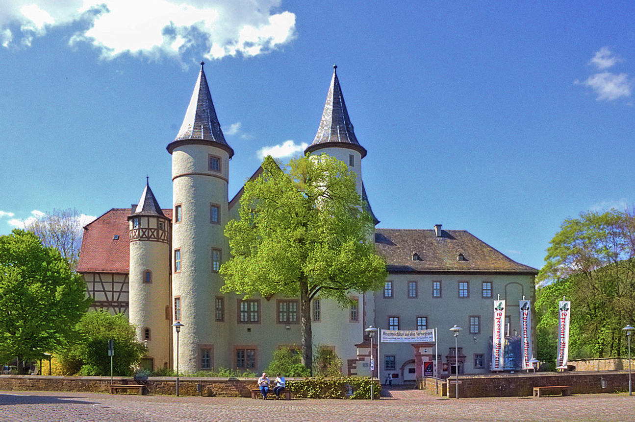 Schloss Lohr am Main, Kurmainzer Schloss, 15.-17. Jh., Spessart-Museum